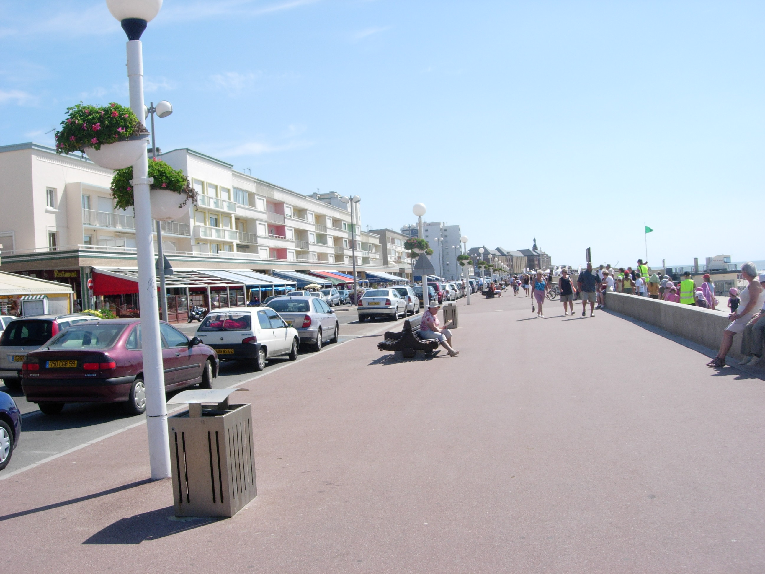 l'esplanade de Berck